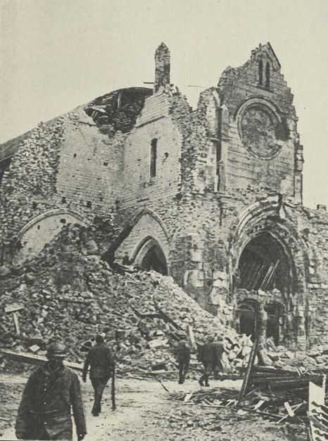 L'église de Moreuil le soir du 8 aoùt 1918.